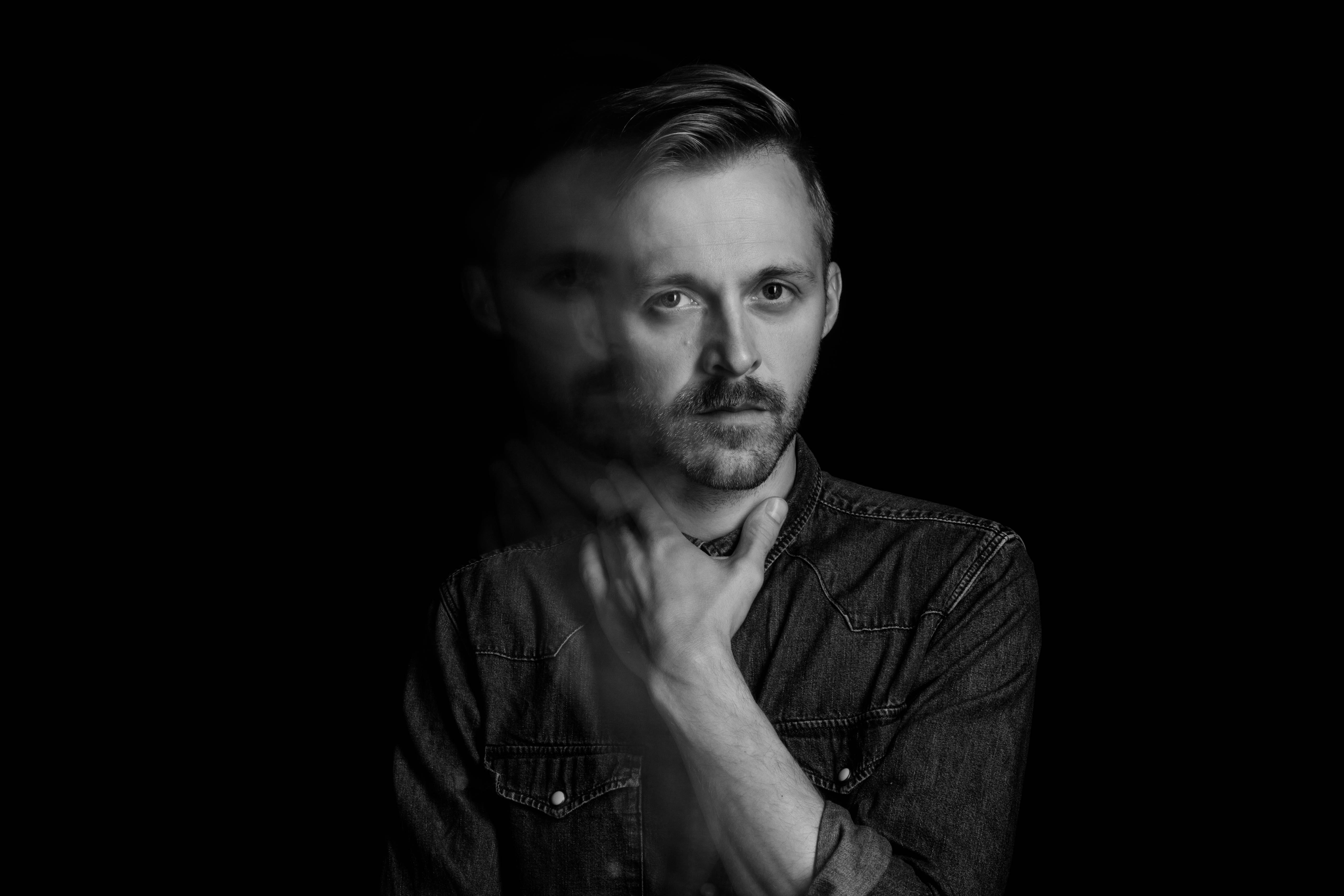 Estonian songwriter and musician